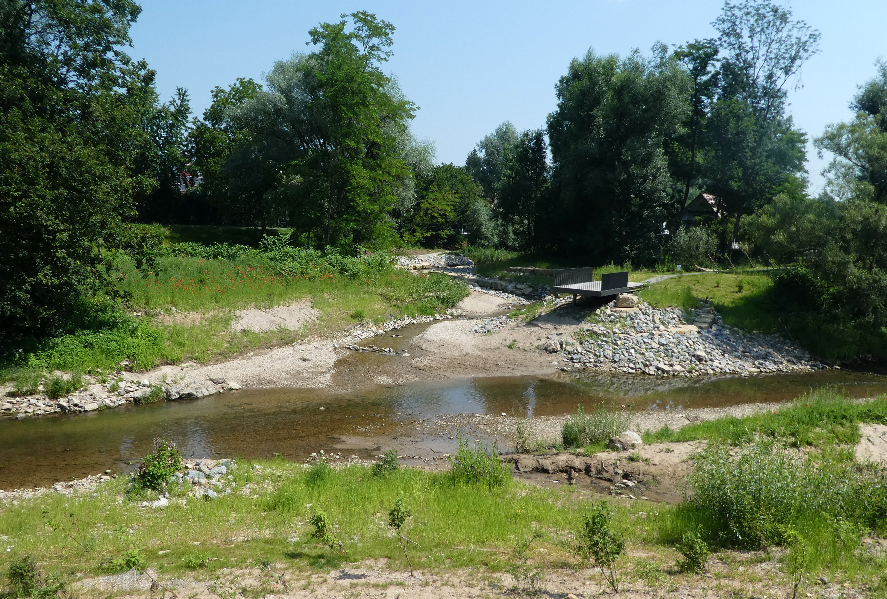 Schorndorf - Mündung eines kleinen Seitenarms der Wieslauf in die Rems, die im Vordergrund von rechts nach links verläuft. Diese obere Mündung entstand im Rahmen einer Renaturierung zur Remstal-Gartenschau 2019. Im Hintergrund der Hauptarm der Wieslauf, der unverändert fünfzig Meter weiter unten in die Rems mündet.